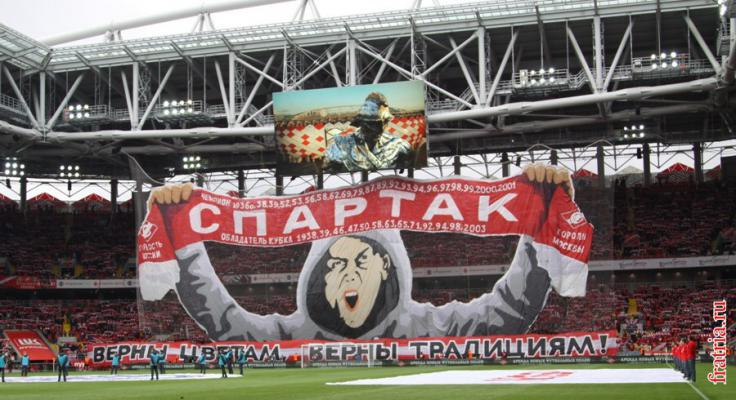 Перформанс с фанатом, держащим спартаковский шарф